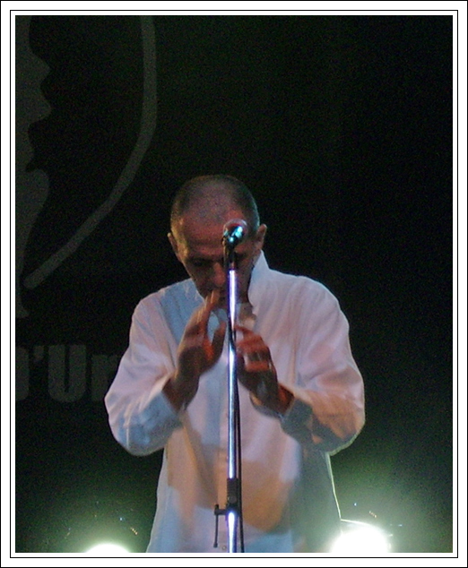 Giovanni Lindo Ferretti si esibisce con il gruppo musicale italiano Per Grazia Ricevuta alla XV festa di Radio Onda d'urto, Brescia (agosto 2006).